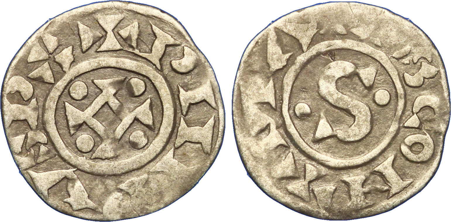 Nom de l'atelier : Mâcon Métal : argent Diamètre : 17,5mm Axe des coins : 3h. Poids : 0,85g. Titulature avers : + PIIIPVS RX. Description avers : Croix avec losange évidé en cœur, cantonnée de quatre globules. Traduction avers : (Philippe, roi). Titulature revers : + MATISCON, (légende commençant à 1 heure). Description revers : S accostée de deux globules. Traduction revers : (Mâcon).